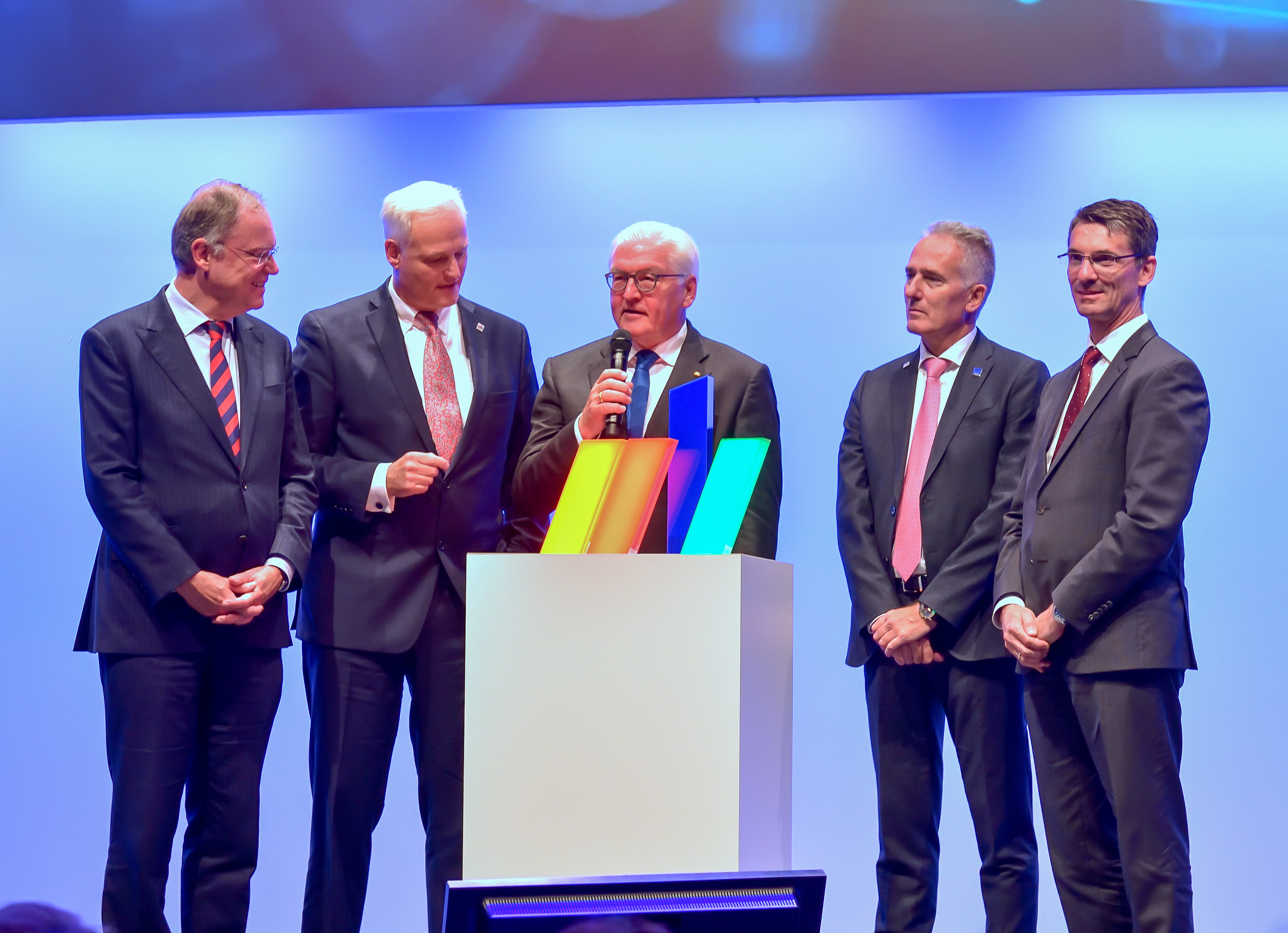 OffizielleEröffnung der EMO Hannover 2017